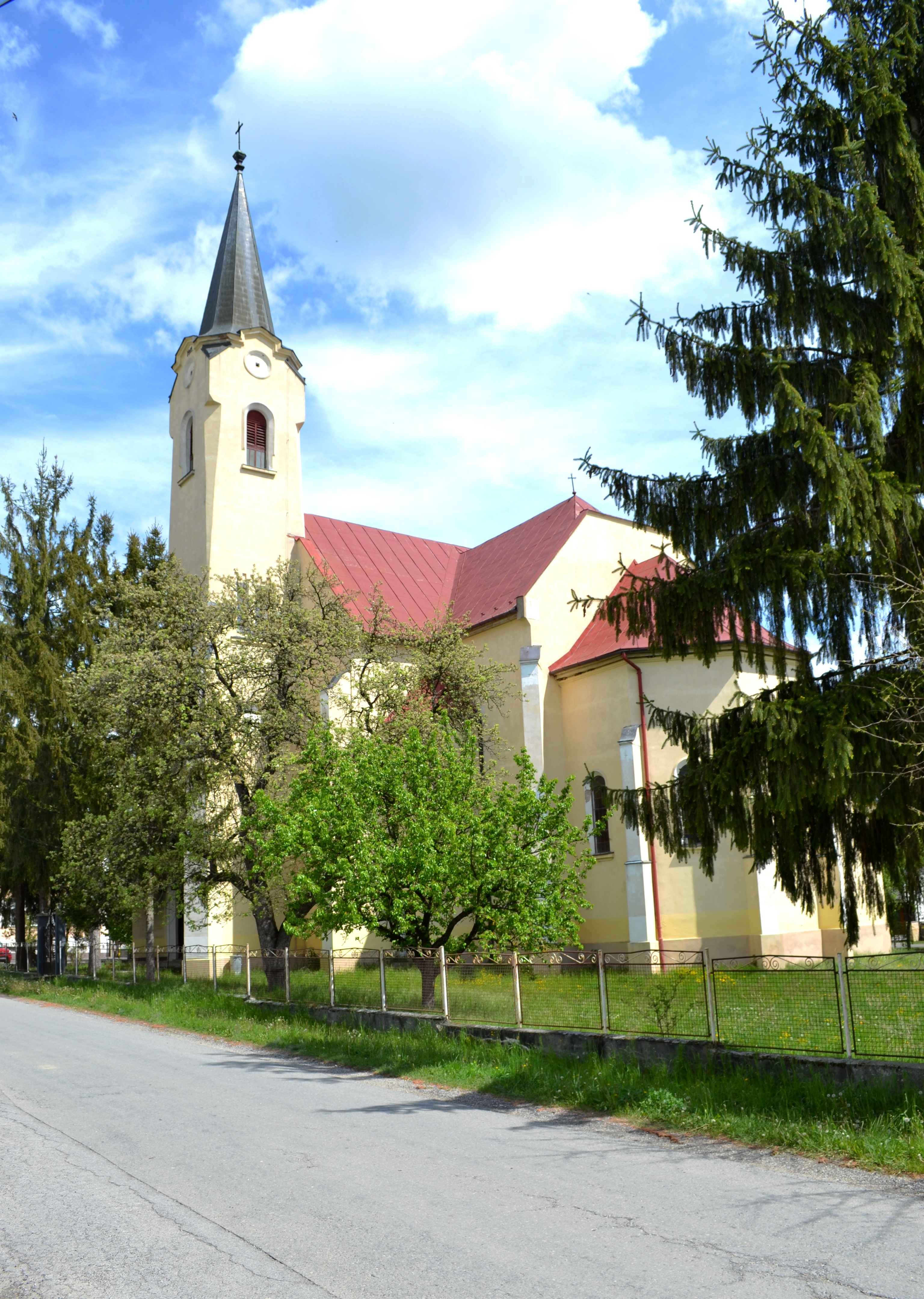 Rímskokatolícky kostol Narodenia sv. Anny v Sušanoch